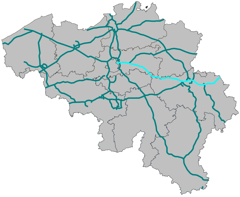 Traject A3 (België)